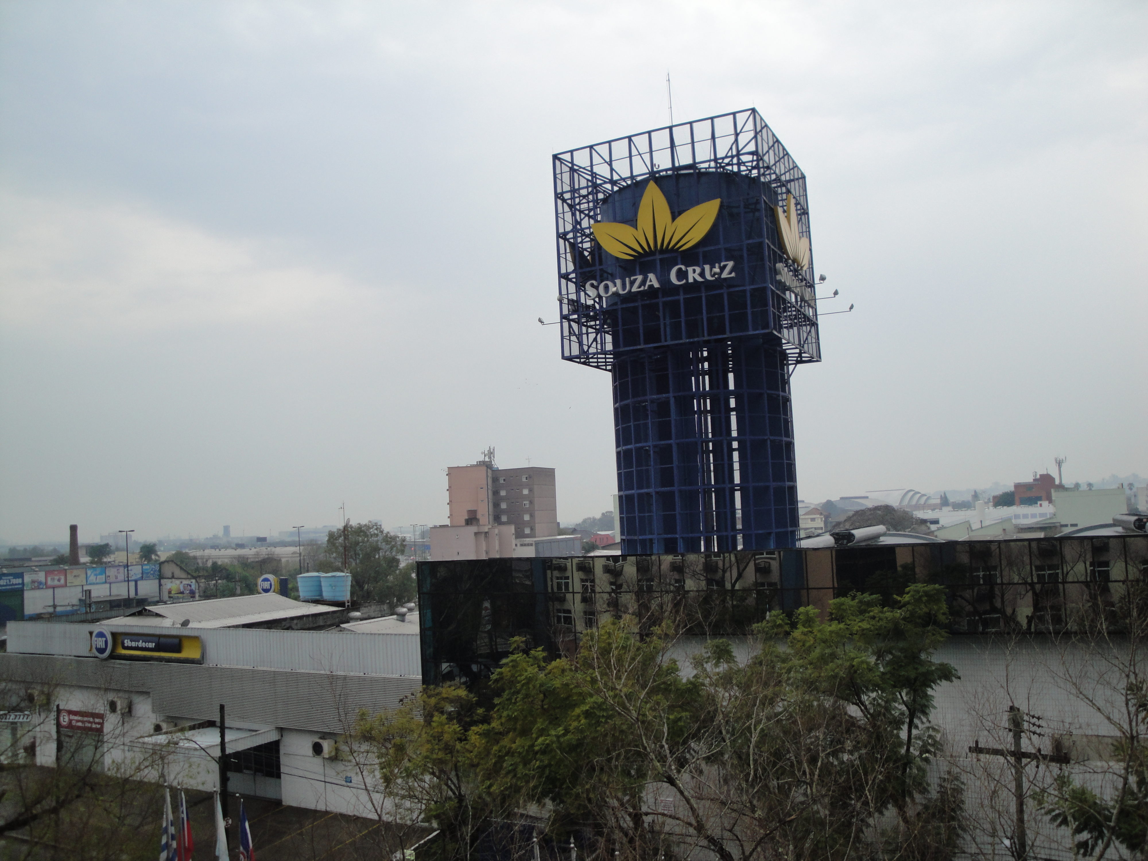 souza cruz - porto alegre